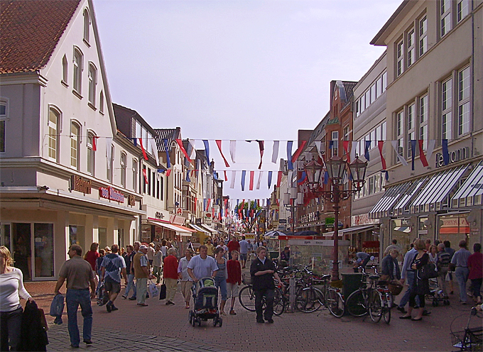 Heide Friedrichstraße